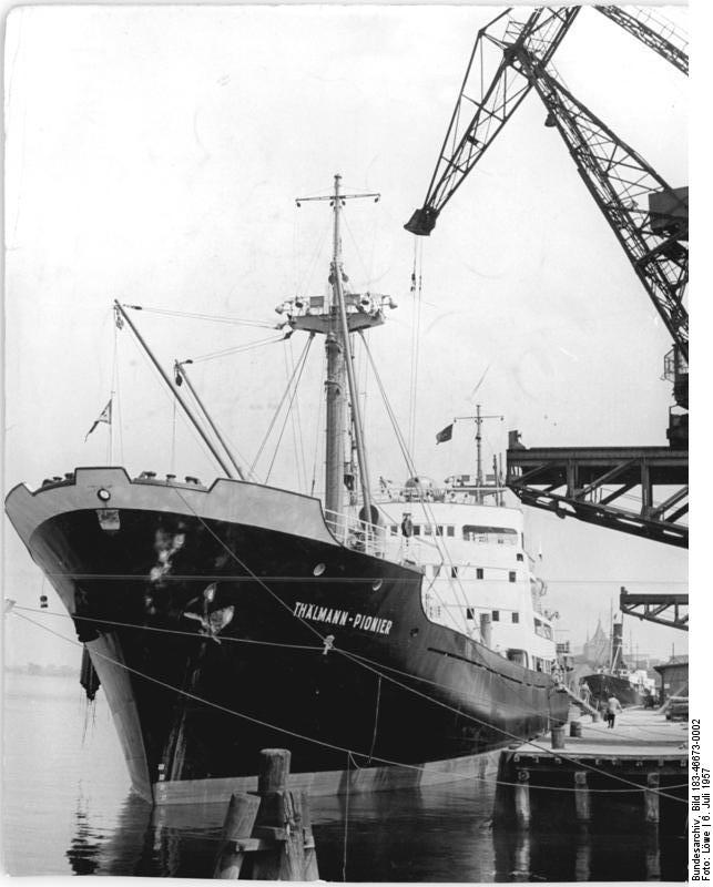 Rostock, Hafen, Frachter Zentralbild Löwe 6.7.1957 Frachter "Thälmann-Pionier" löscht Ladung aus Albanien - Der Frachter "Thälmann-Pionier", der am 3.7.1957 nach einer mehrwöchigen Mittelmeerreise im Rostocker Hafen festmachte, löscht gegenwärtig eine aus Albanien mitgebrachte Ladung von 549 Tonnen Frühkartoffeln, die in der befreundeten Volksrepublik unter Mithilfe deutscher Spezialisten für die DDR angebaut wurden. Mit dem erweiterten Kartoffelanbau in Albanien wird eine umfangreichere Exportmöglichkeit für das Land im Süden geschaffen und für die Bevölkerung der DDR eine bessere Versorgung mit Frühkartoffeln gewährleistet. Das für den erweiterten Kartoffelanbau notwendige Pflanzgut sowie die Mineraldüngemittel stellte die DDR zur Verfügung. UBz: Der Frachter "Thälmann-Pionier" am Kai des Hafens.